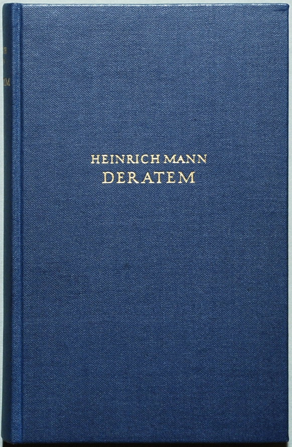 Mannn, Heinrich: Der Atem. Roman. Amsterdam: Bermann-Fischer Querido 1949, 345 Seiten. Erstdruck (Wilpert/Gühring² 93). Original-Einband des Verlags.